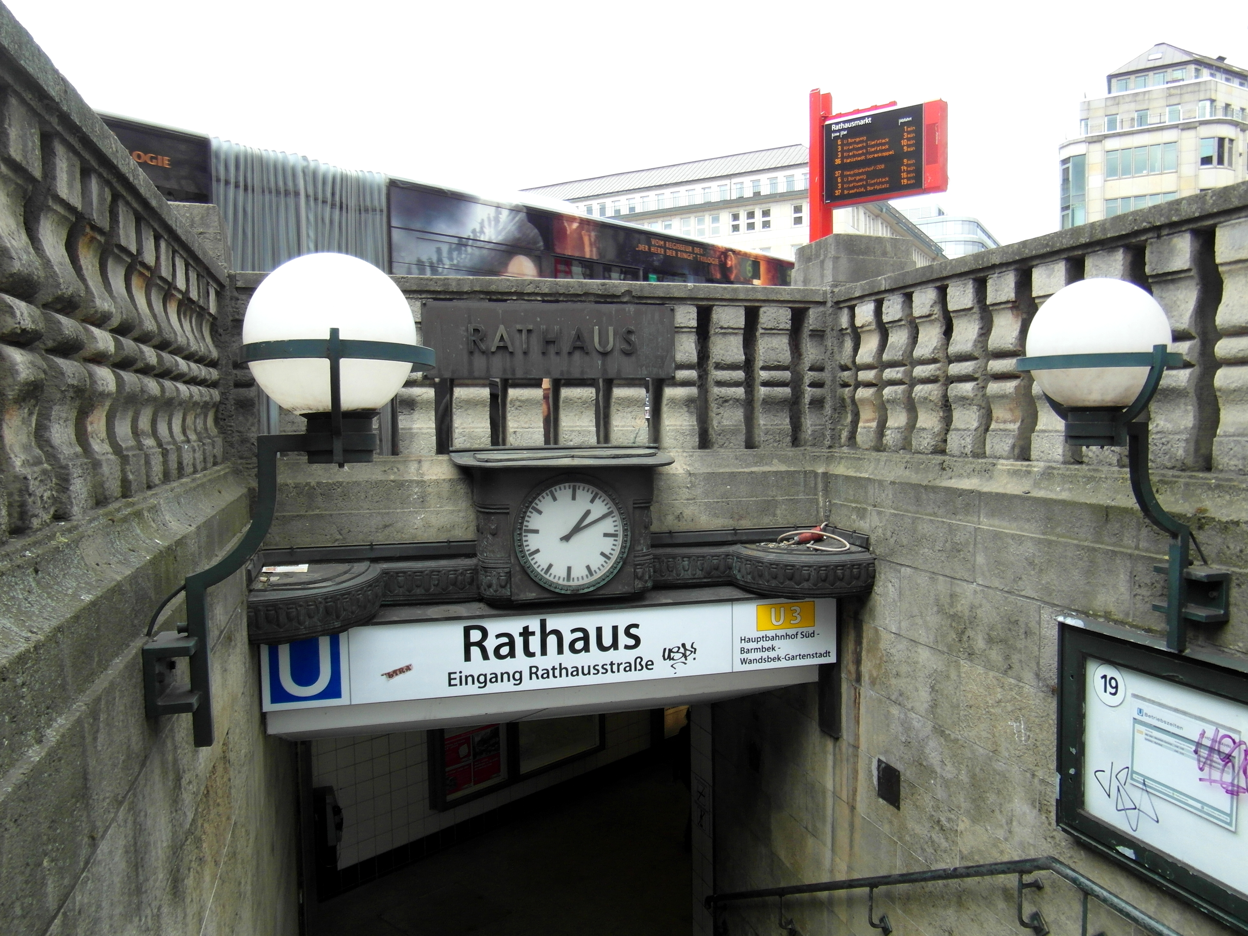 U-Bahnhof Rathaus in Hamburg - Linie U3